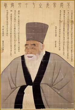 송시열상(宋時烈像) 조선시대, 선 중기의 대표적인 유학자인 우암 송시열(1607∼1689) 의 초상화